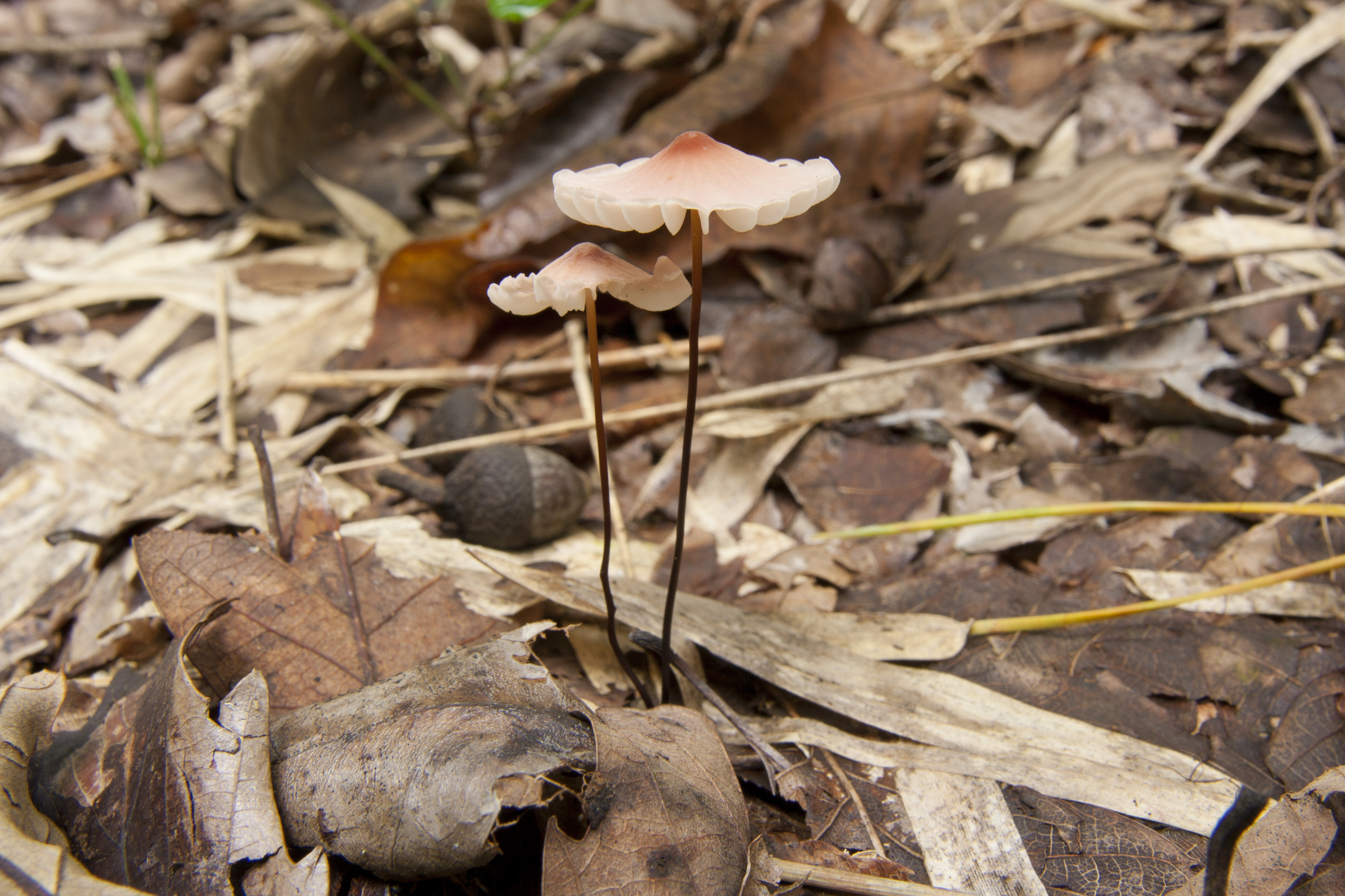 ハナオチバタケ (学名:Marasmius pulcherripes)